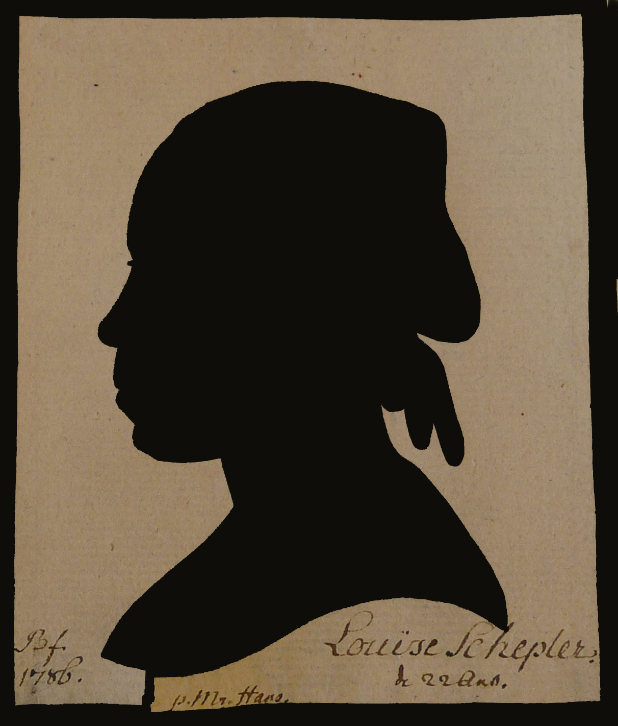 Silhouette de Louise Scheppler (1763-1837), âgée de 22 ans (servante du pasteur Oberlin), réalisée par lui (Musée Oberlin)